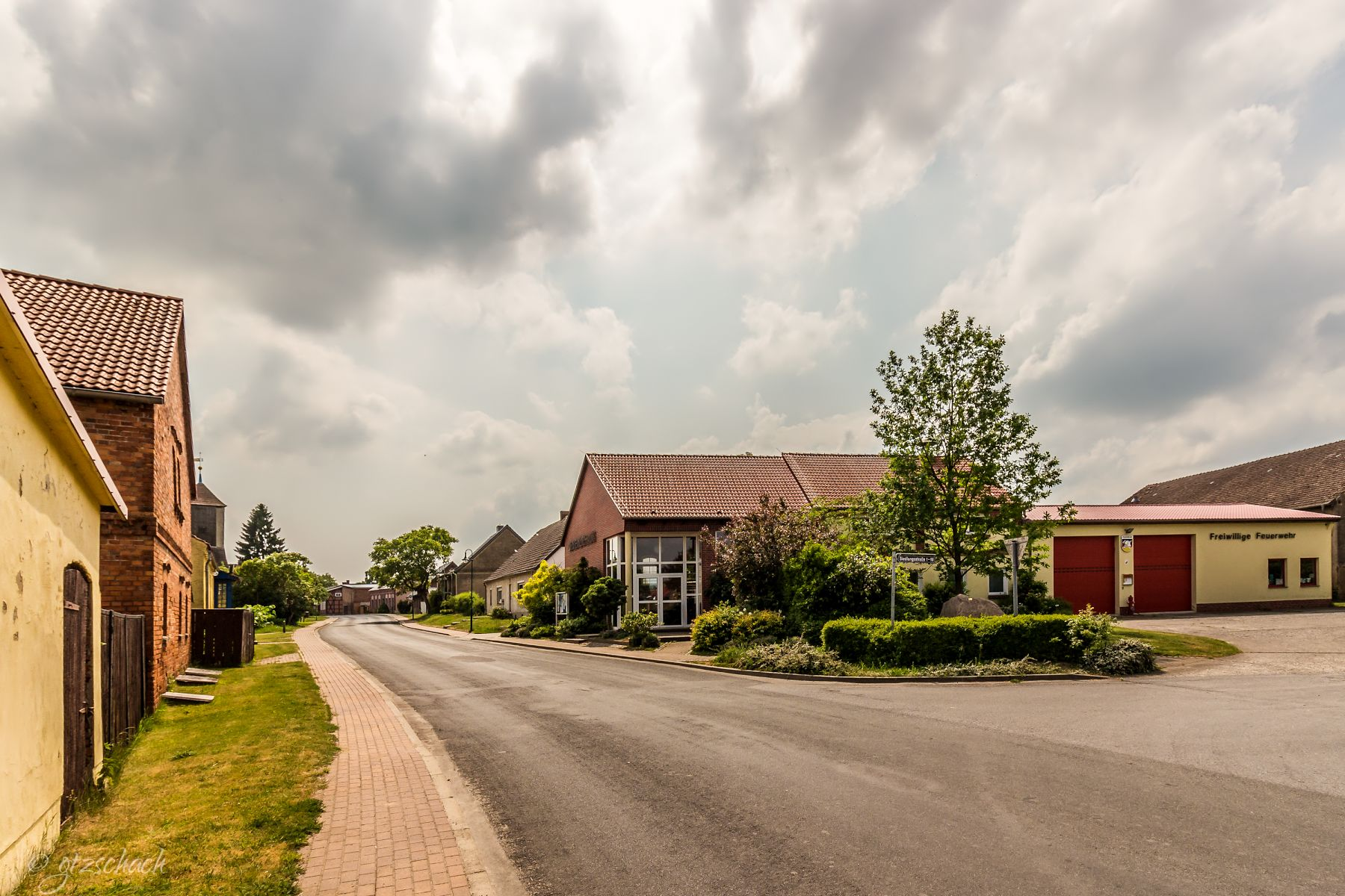 Fredersdorf Dorfstrasse am Gemeindehaus und Feuerwehr